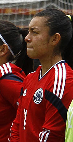 Quito, 28 sep (Andes).- La selección brasileña femenina de fútbol se proclamó Campeona de la Copa América de Fútbol Ecuador 2014. Foto: Micaela Ayala V./Andes